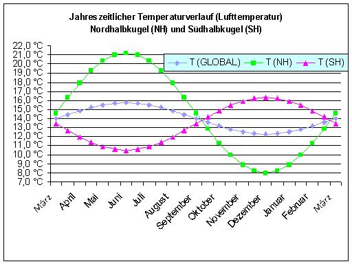 Quelle: P. D. Jones et. al.: SURFACE AIR TEMPERATURE AND ITS CHANGES OVER THE PAST 150 YEARS (Seite 196)